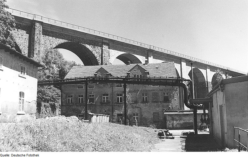 Original image description from the Deutsche Fotothek Löbau. Ehem. Wetschkemühle